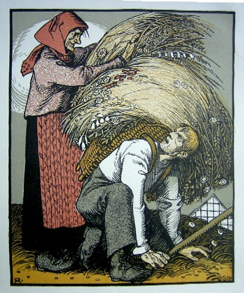 Illustration zu: Brüder Grimm: Die hagere Liese. Lithographie, 15 x 16 cm